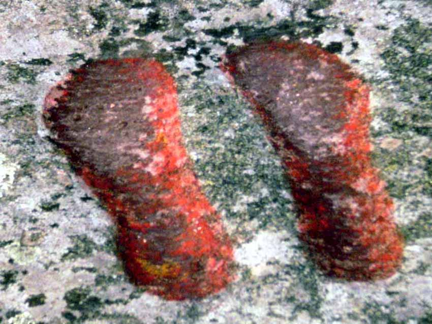 "Dansskolan i Godegården", Fåglum 2010, hällristning